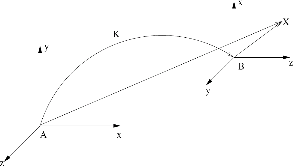 Special Euclids Group